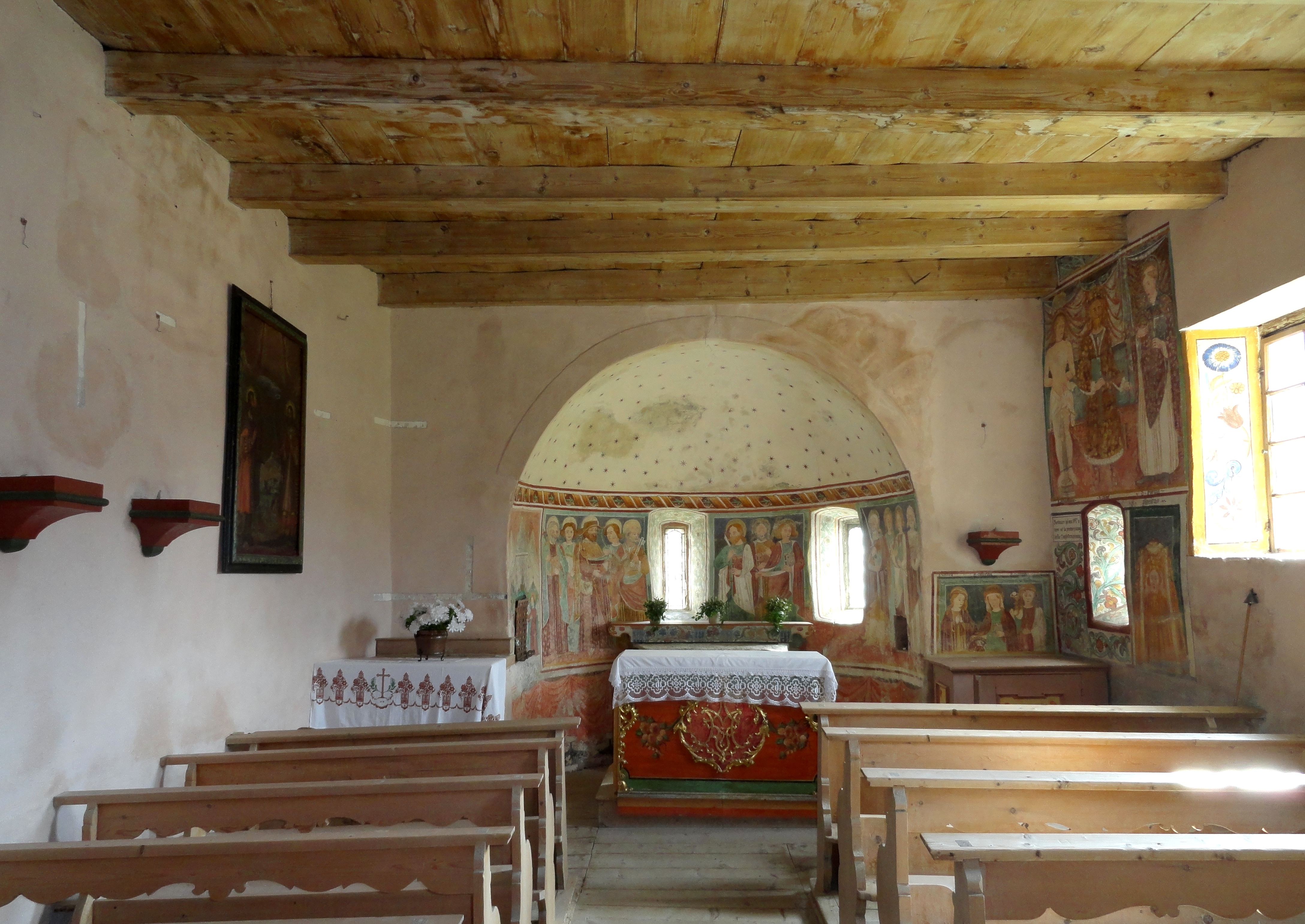 Kirche St. Cosmas und Damian (Mon GR): Innenraum